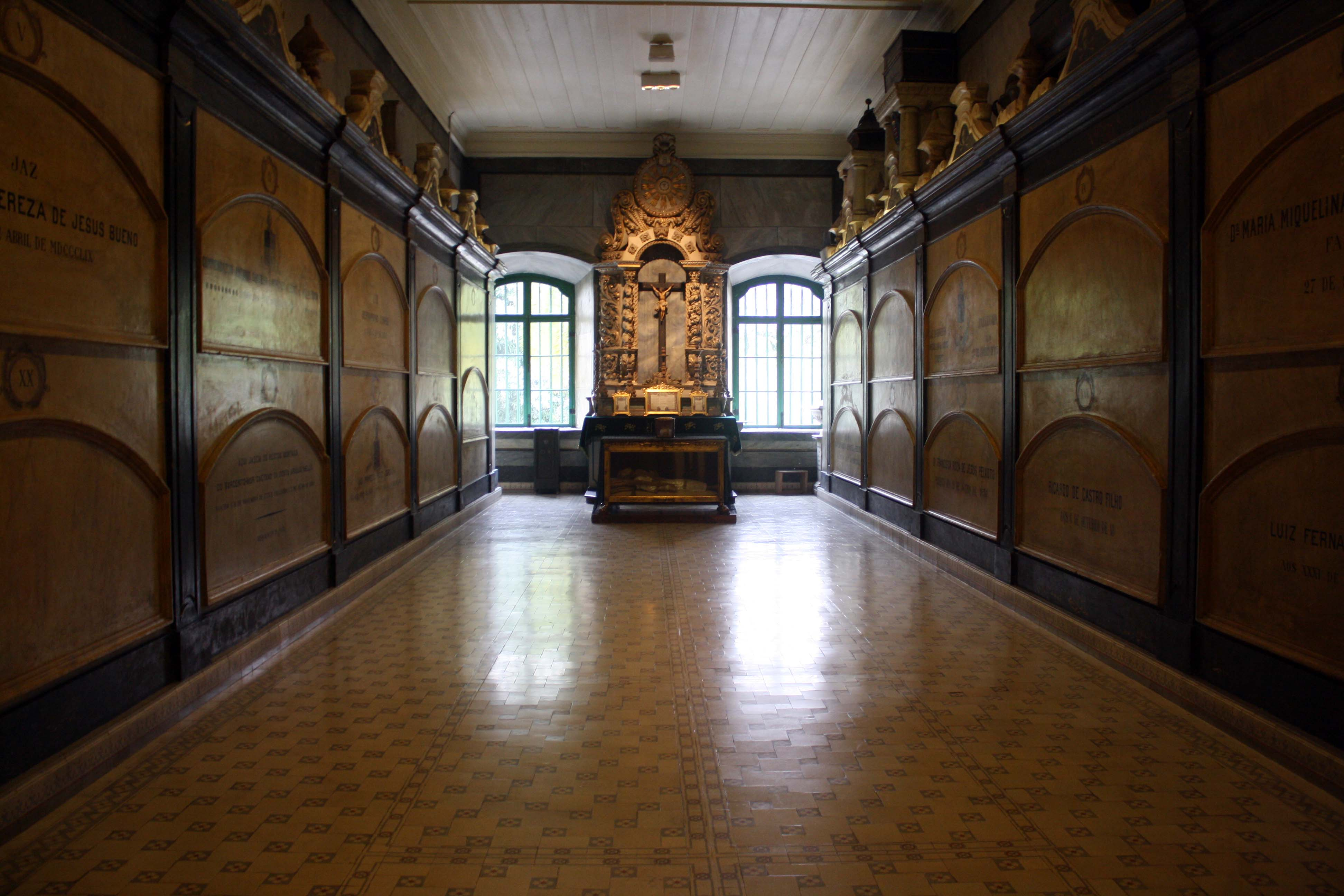 Sala com covas e cinzas da elite na Igreja das Chagas do Seráfico Pai São Francisco, em São Paulo (SP), Brasil